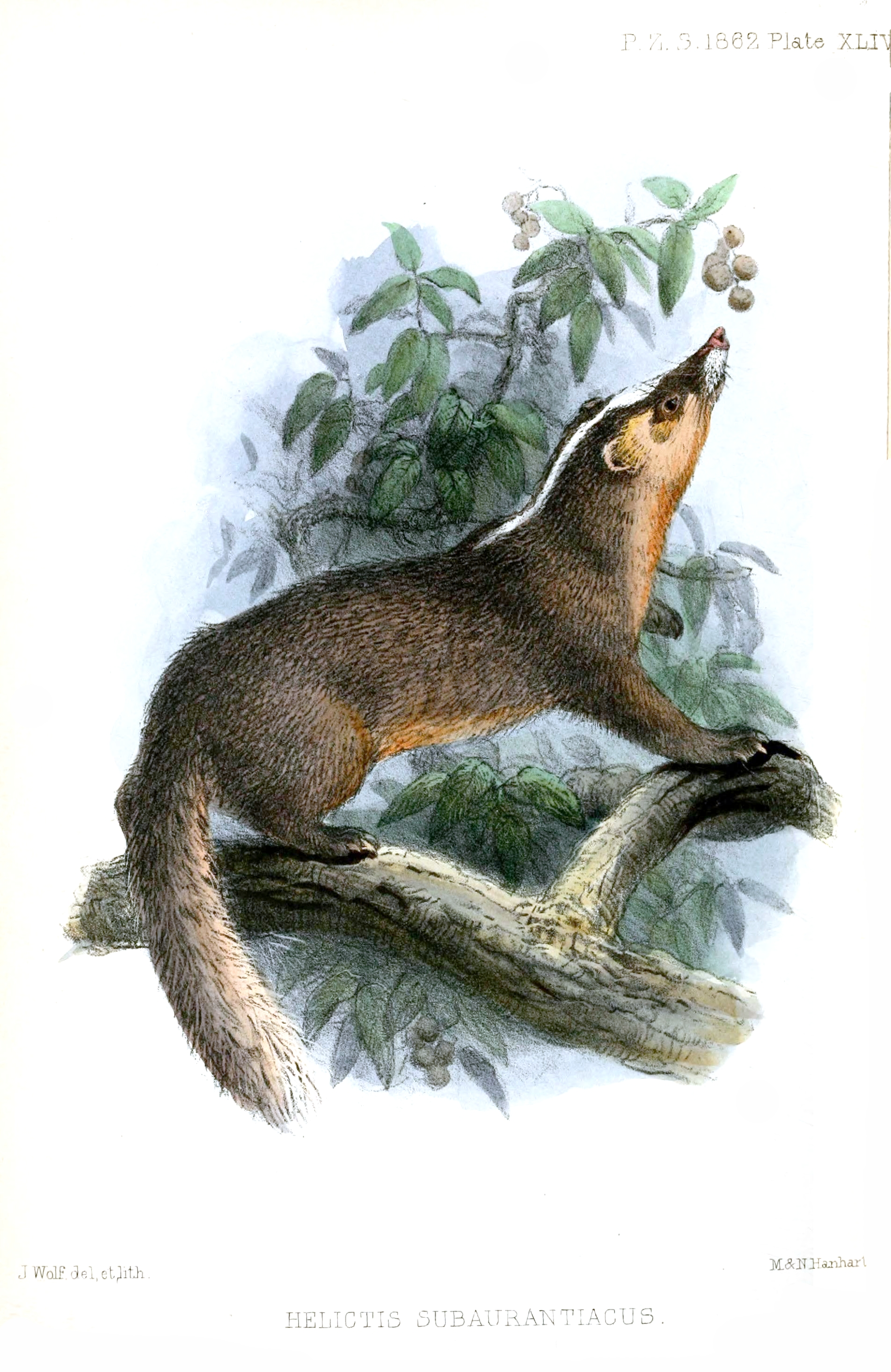 Helictis subaurantiacus= Melogale moschata subaurantiaca